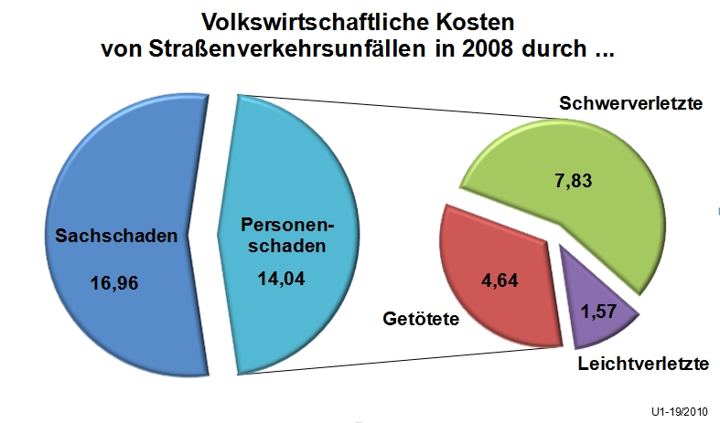 Kreis-Diagramm der Volkswirtschaftliche Unfallkosten im Jahr 2008